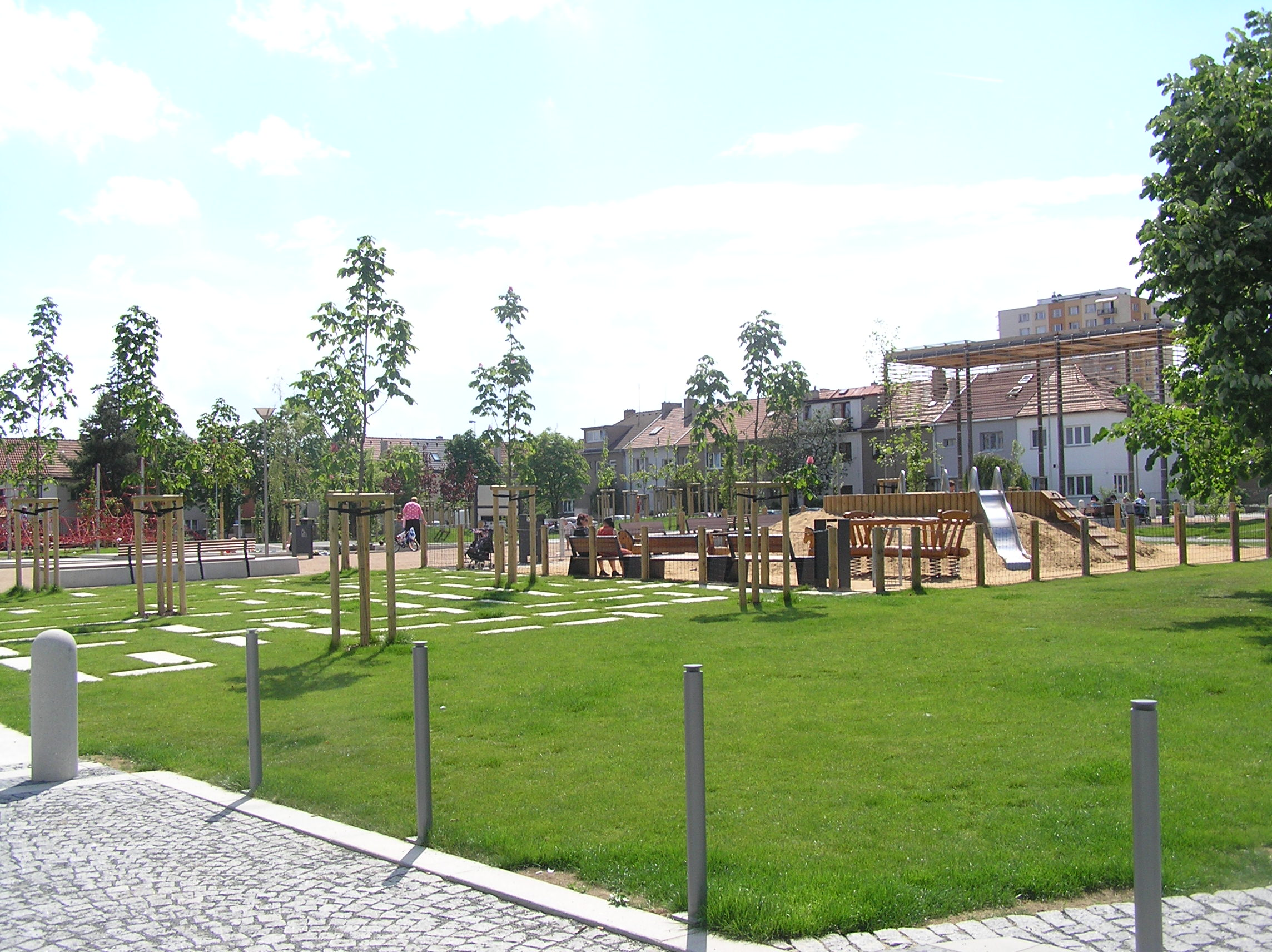 Pohled na park Malinová - Chrpová